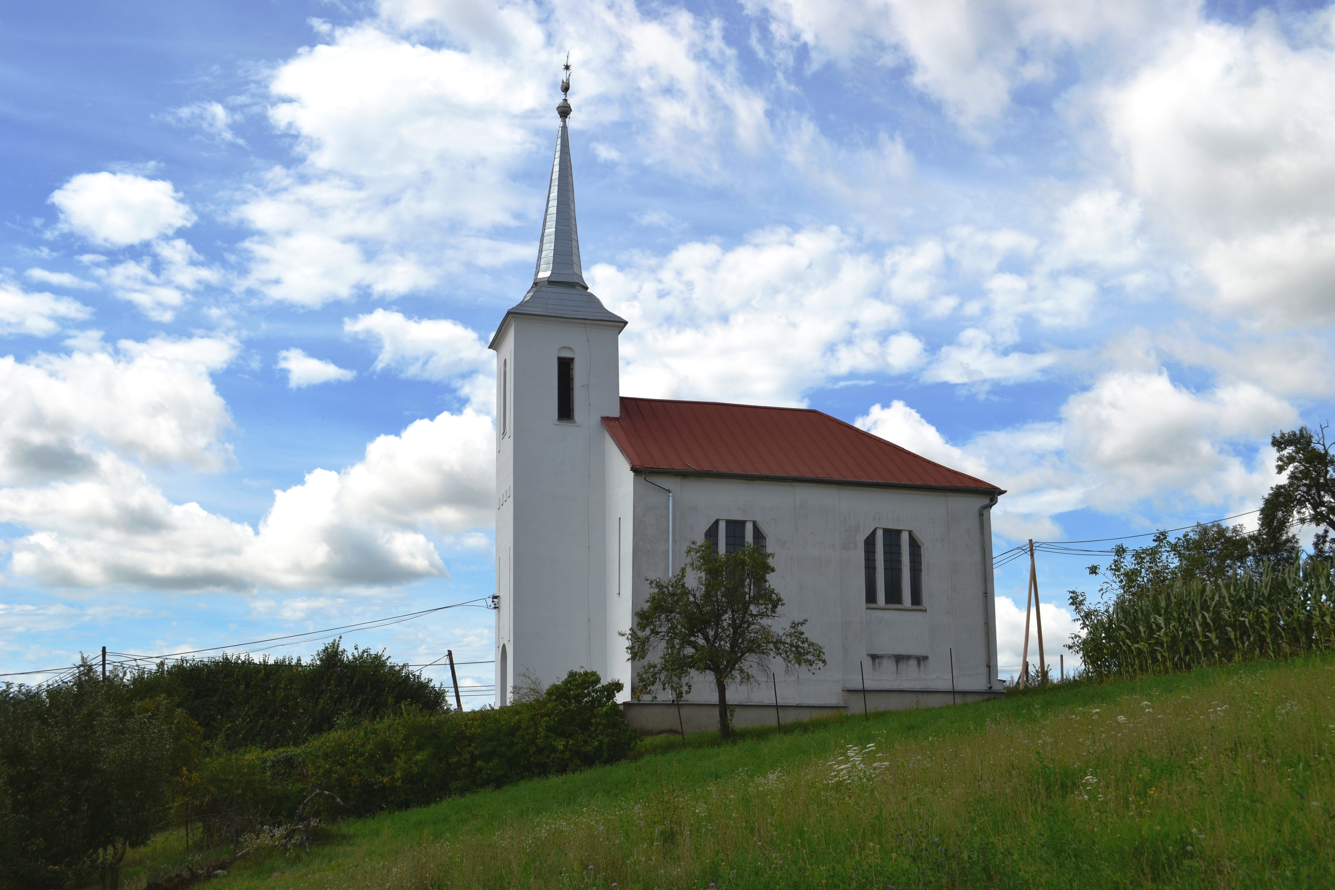 Lenka, reformovaný kostol z roku 1786